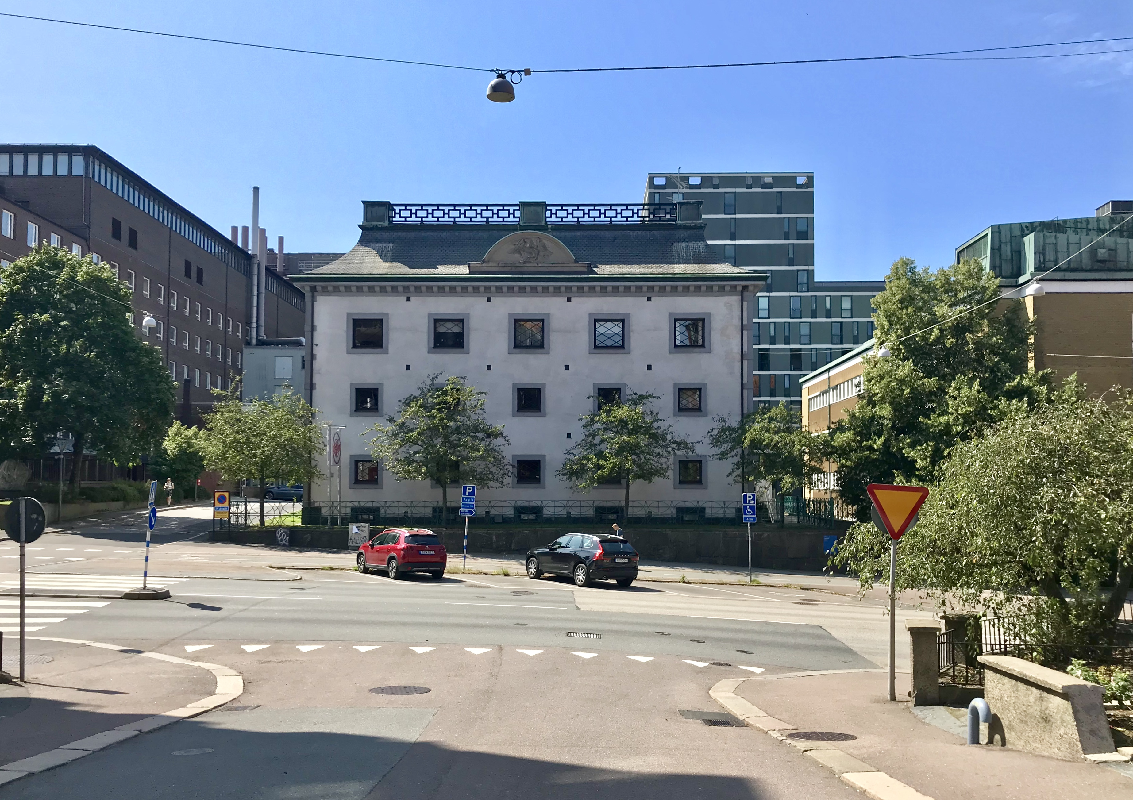 F.d. elstationen (transformatorstationen) vid Gibraltargatan 3 i Johanneberg, Göteborg. Byggnadsår 1925. Arkitekt Conny Nyquist.